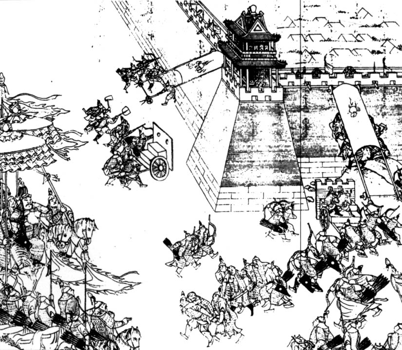 《清实录》中所绘宁远之战